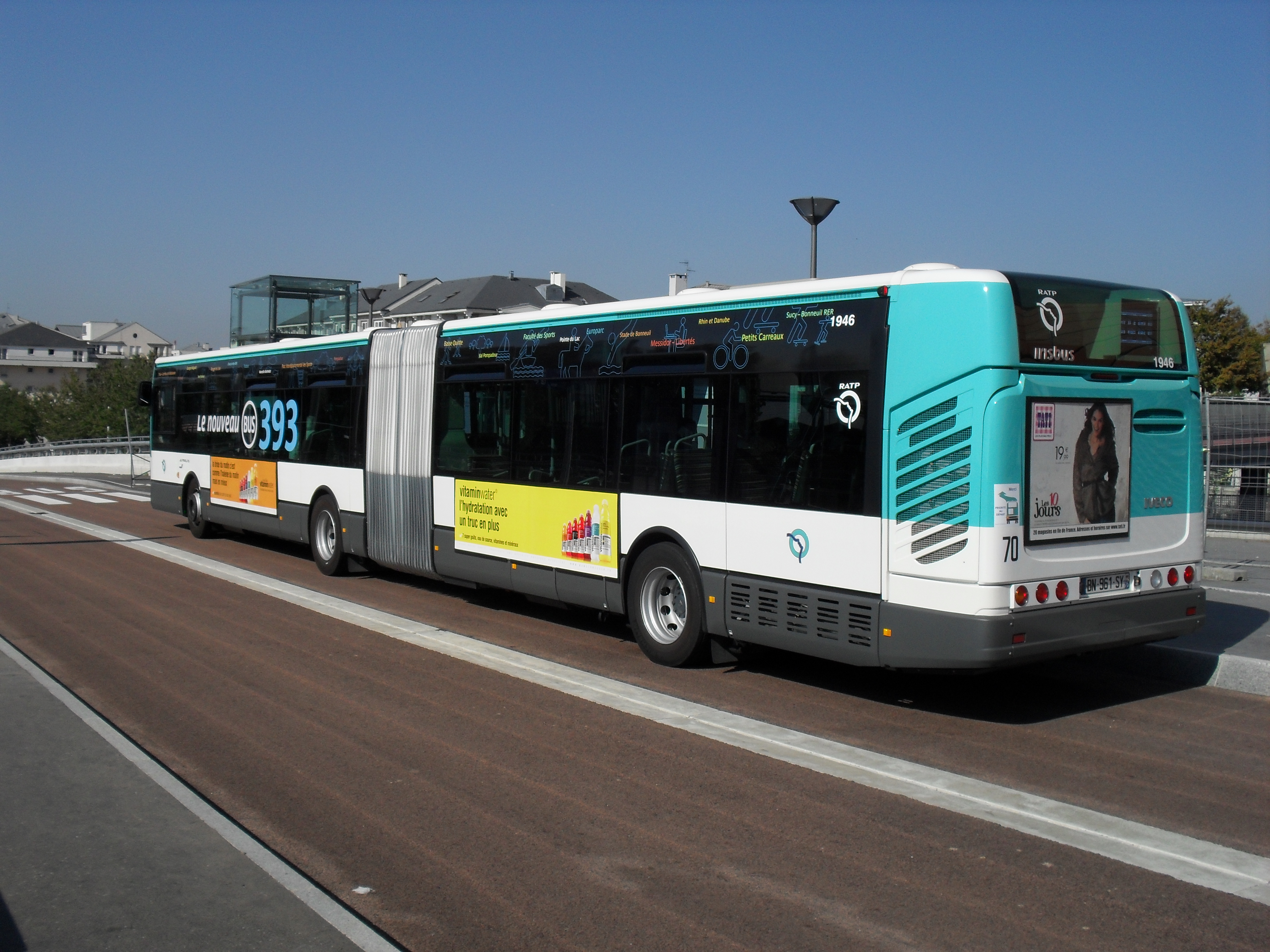 Citelis 18 du TCSP 393 à la station "Pointe du Lac"